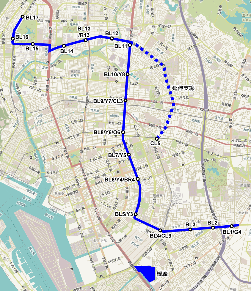 高雄捷運 輕軌藍線 在2000初的規劃